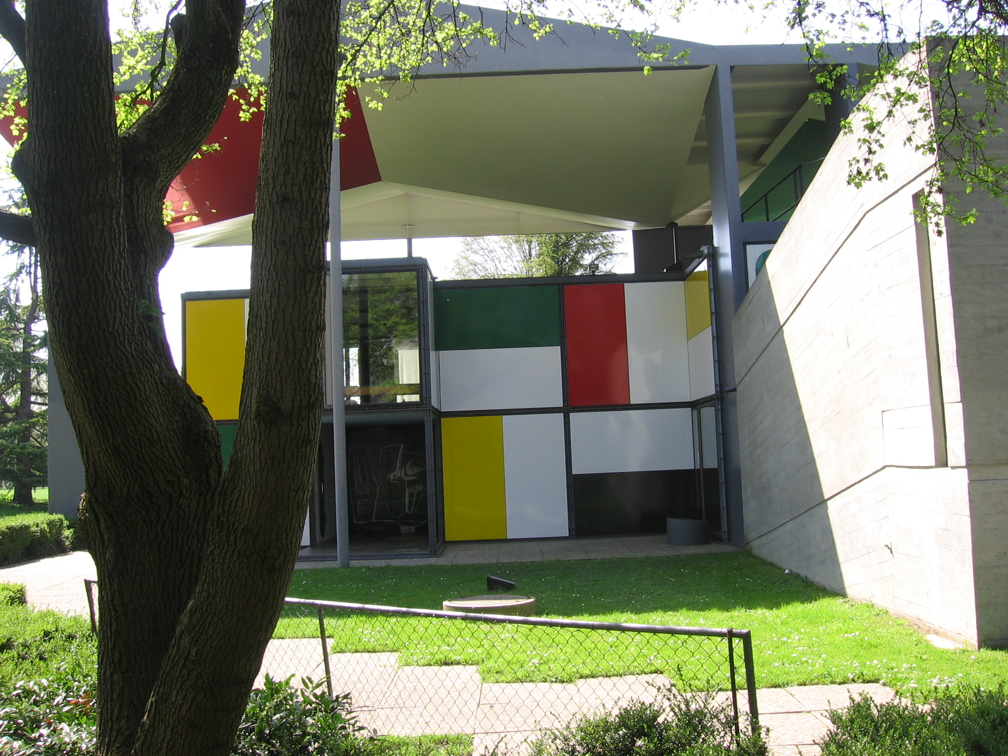 centre Le Corbusier, zurich.